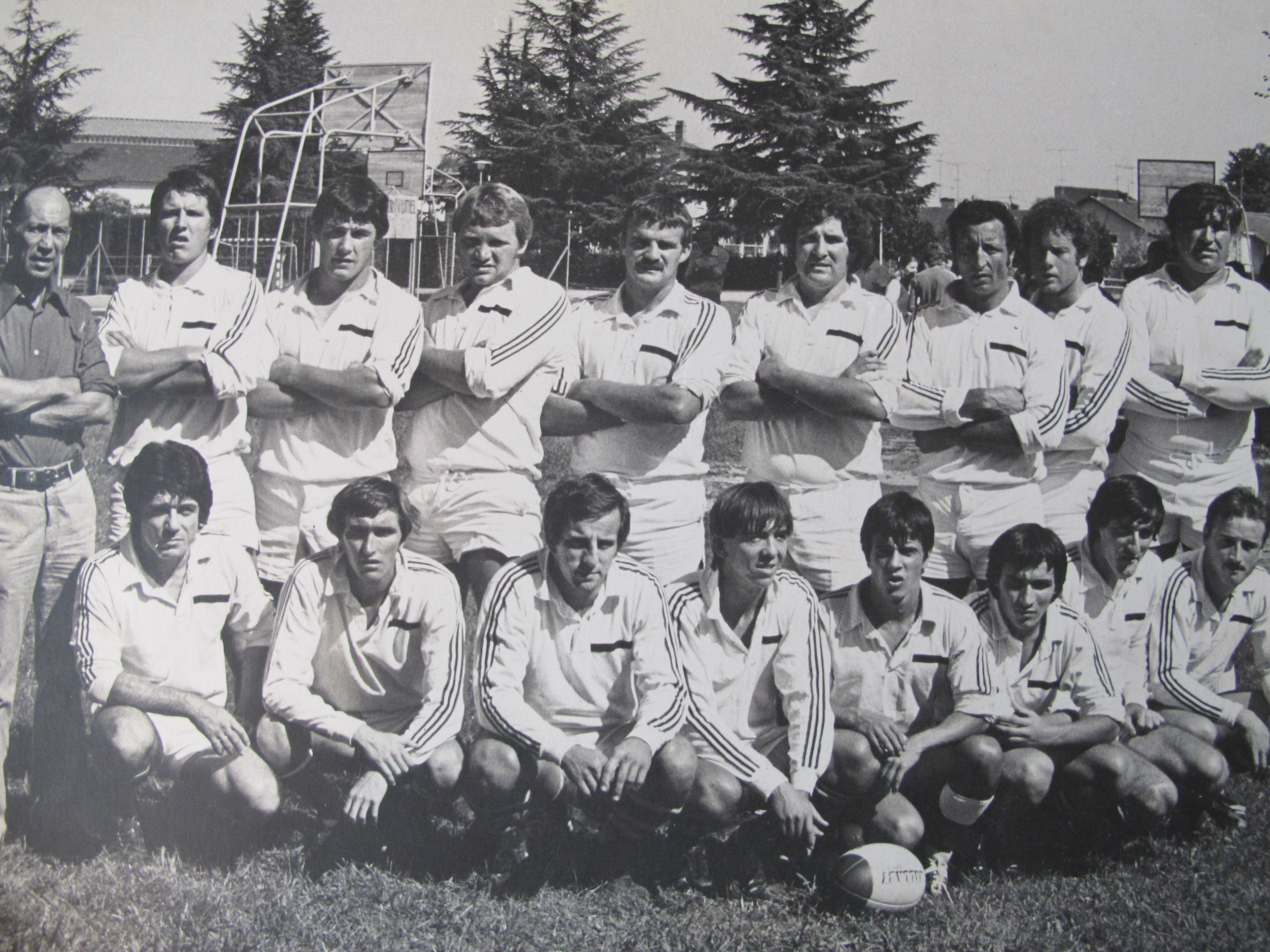 USFL 1978-1978